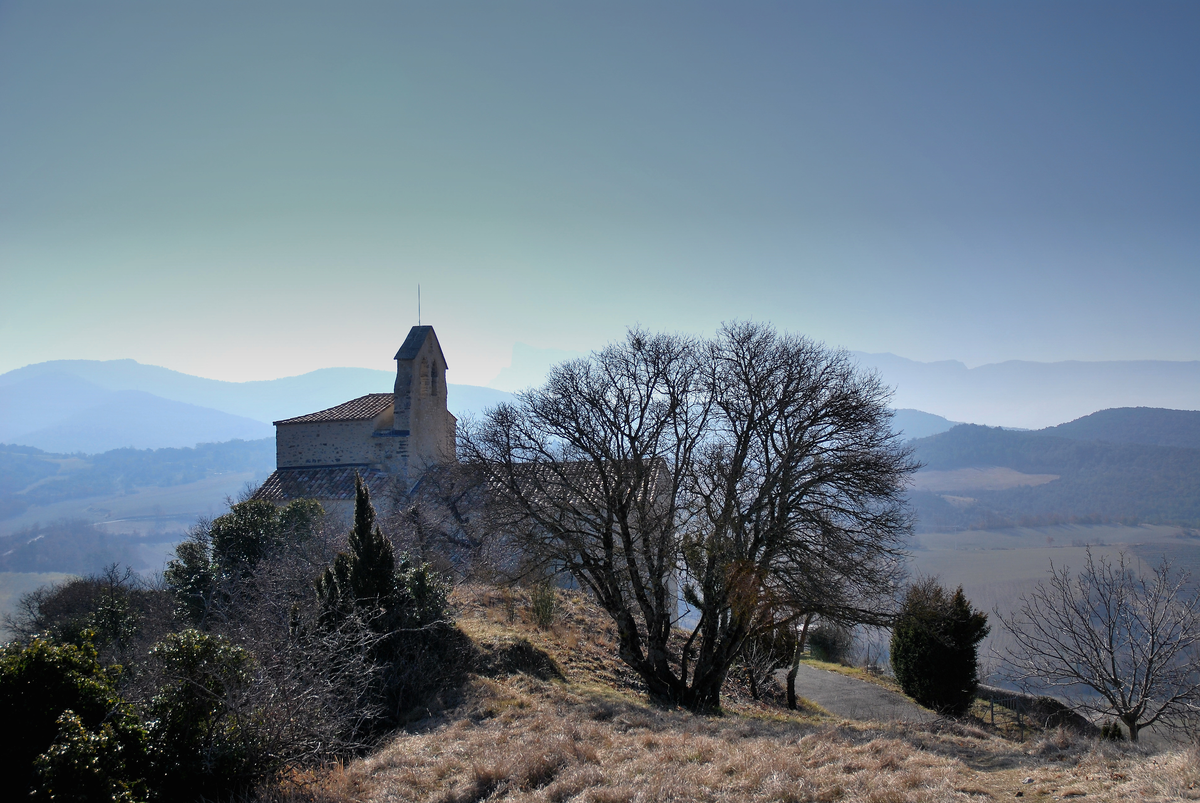 église de Monclar